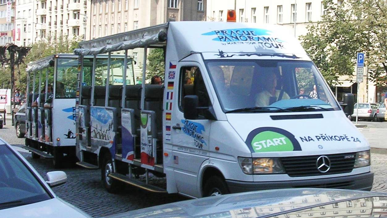 Trackless train / silniční vláček, Praha, Václavské náměstí.